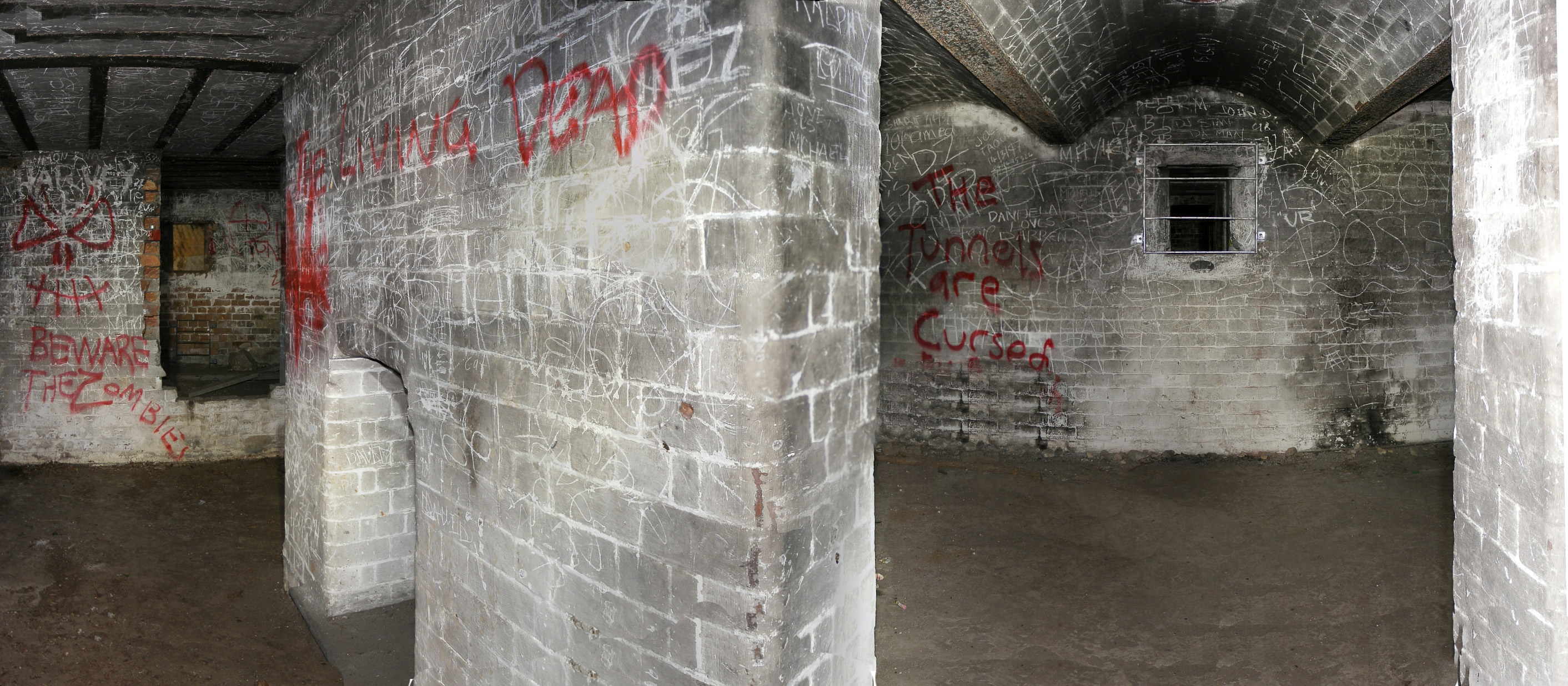 Henry fort Sydney